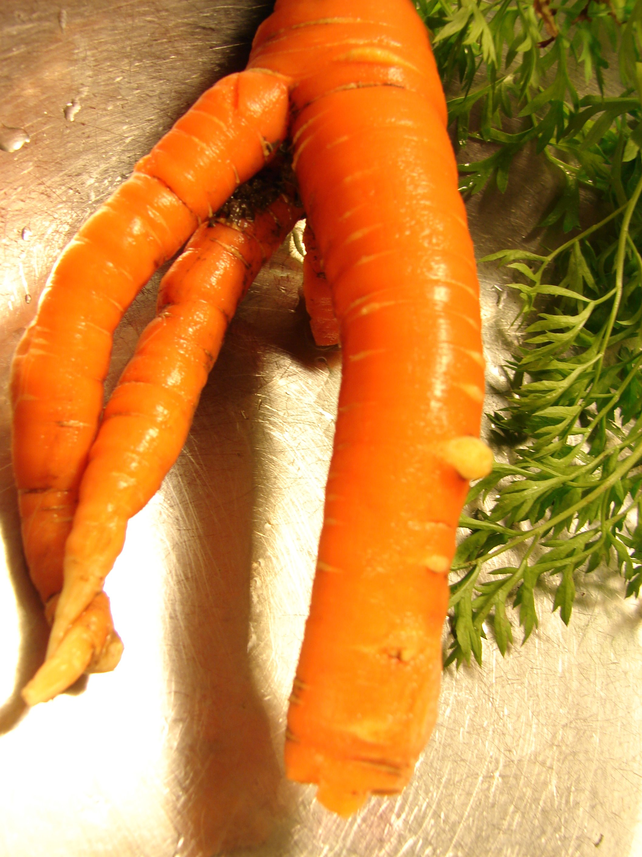 Multiple roots carrot